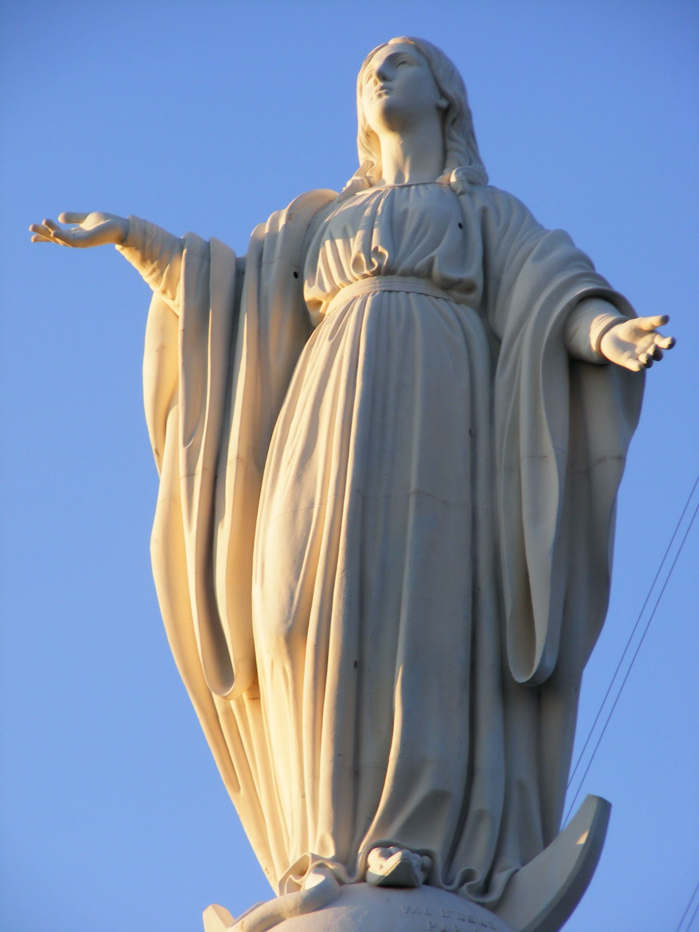 Estatua de la Virgen María en el Cerro San Cristóbal, en santiago de Chile. (por pviojo)